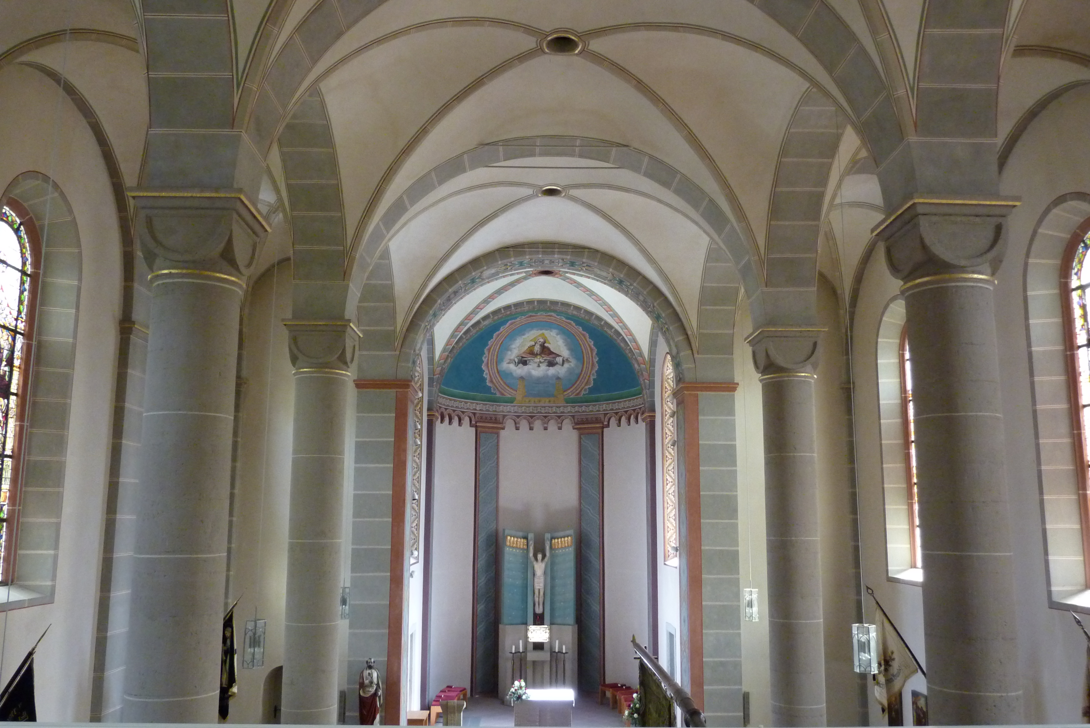 Katholische Pfarrkirche St. Peter in Westum, Innenraum